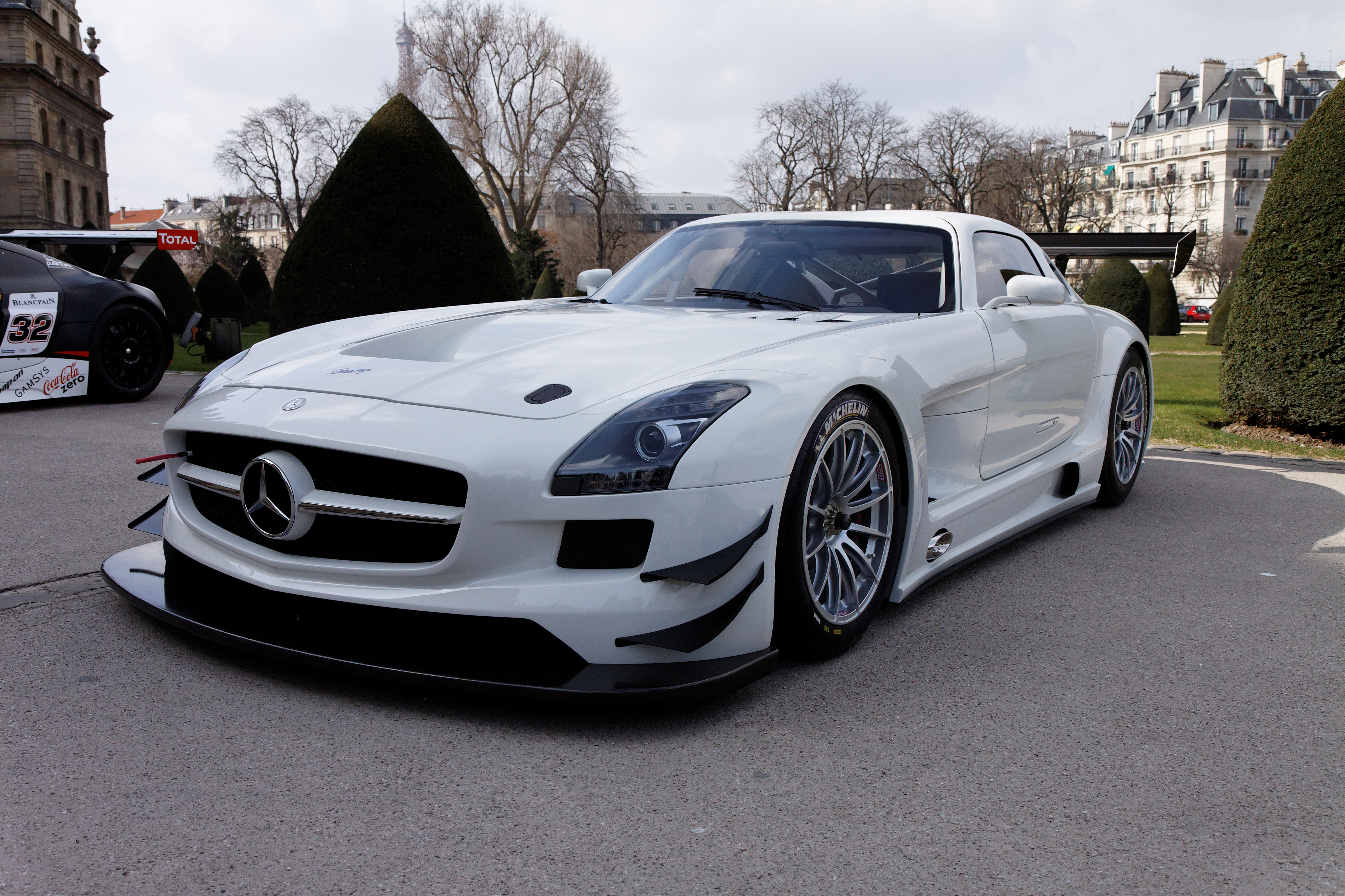 Photographie prise lors de la présentation du Blancpain Endurance series aux Invalides à Paris en mars 2011.